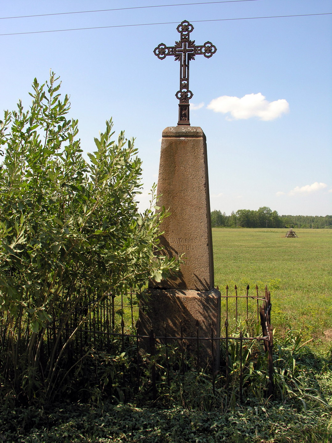 Rekečiai, Mažeikių raj., Viekšnių sen. Kryžius prie kelio per Rekečių kaimą Foto: Algirdas, 2006 m. rugpjūčio 11 d., Lietuva